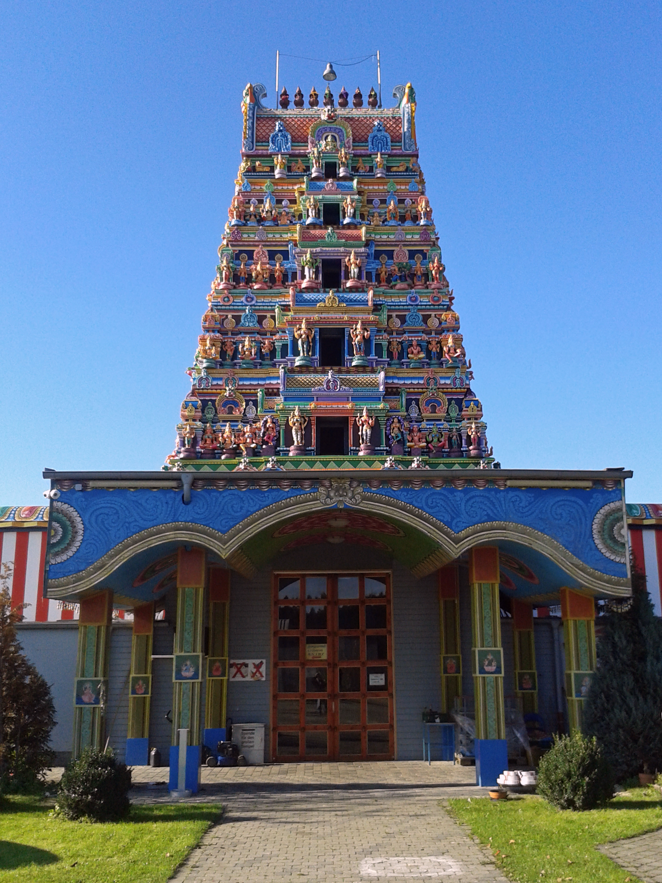 Sri-Kamadchi-Ampal-Tempel mit neu bemaltem Gopuram, 2014